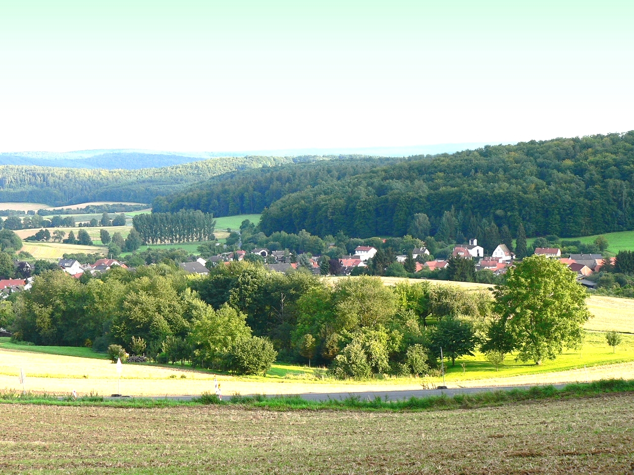 Dorndiel im Odenwald (zu Groß-Umstadt) - Ansicht von Nordost